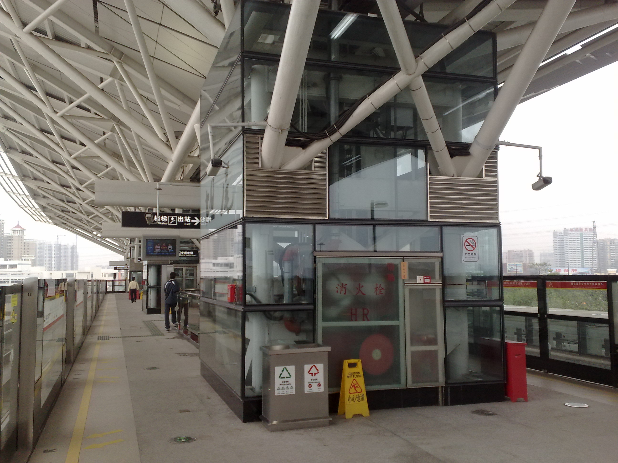 廣州地鐵坦尾站站台